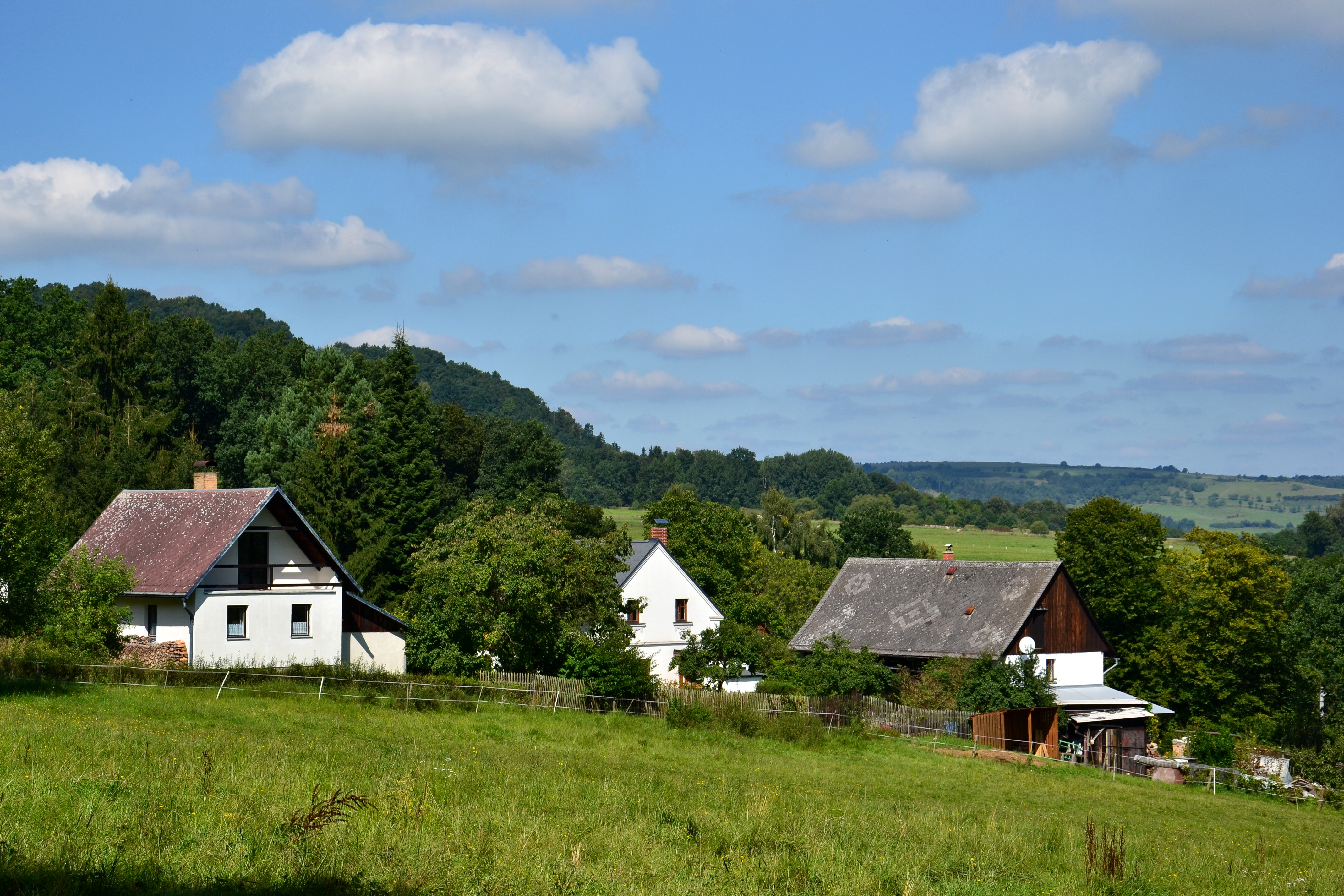 Pohled z jihovýchodu